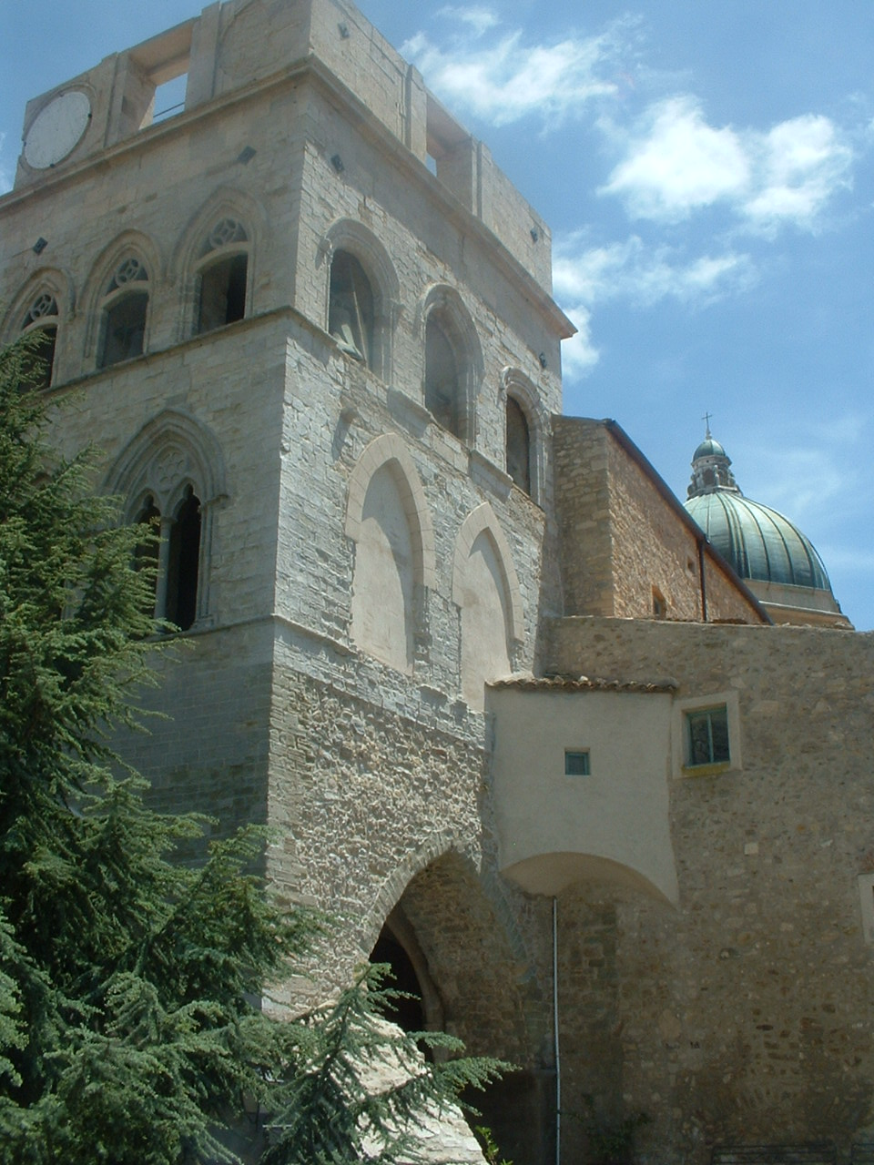 Gangi (PA), Torre civica e cupola della chiesa madre.